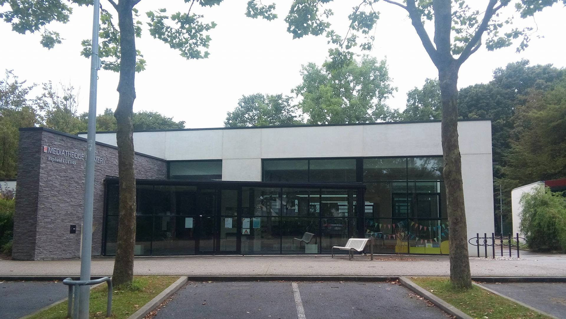 Médiathèque d'Emery à Emerainville (77) en France